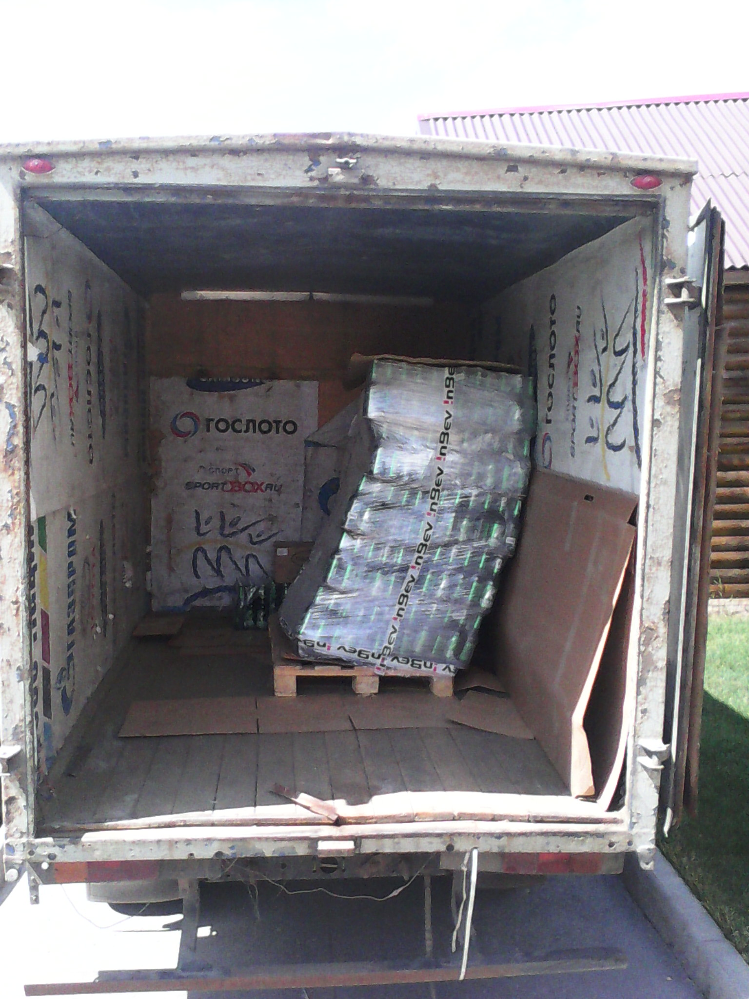 Пиво в термоусадке